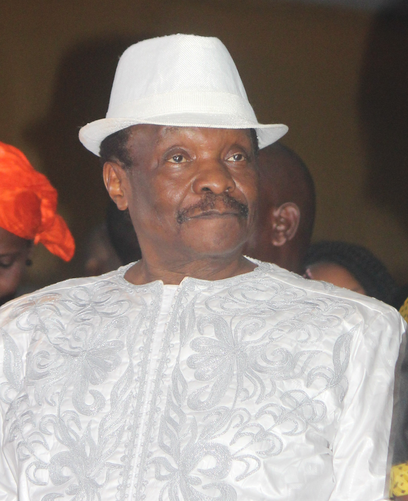 Mory Kanté lors des J Awards Guinée 2019